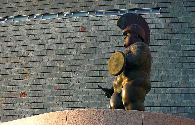 Domus (Casa do Hombre) obra do arquitecto xaponés Arata Isozaki. A Coruña